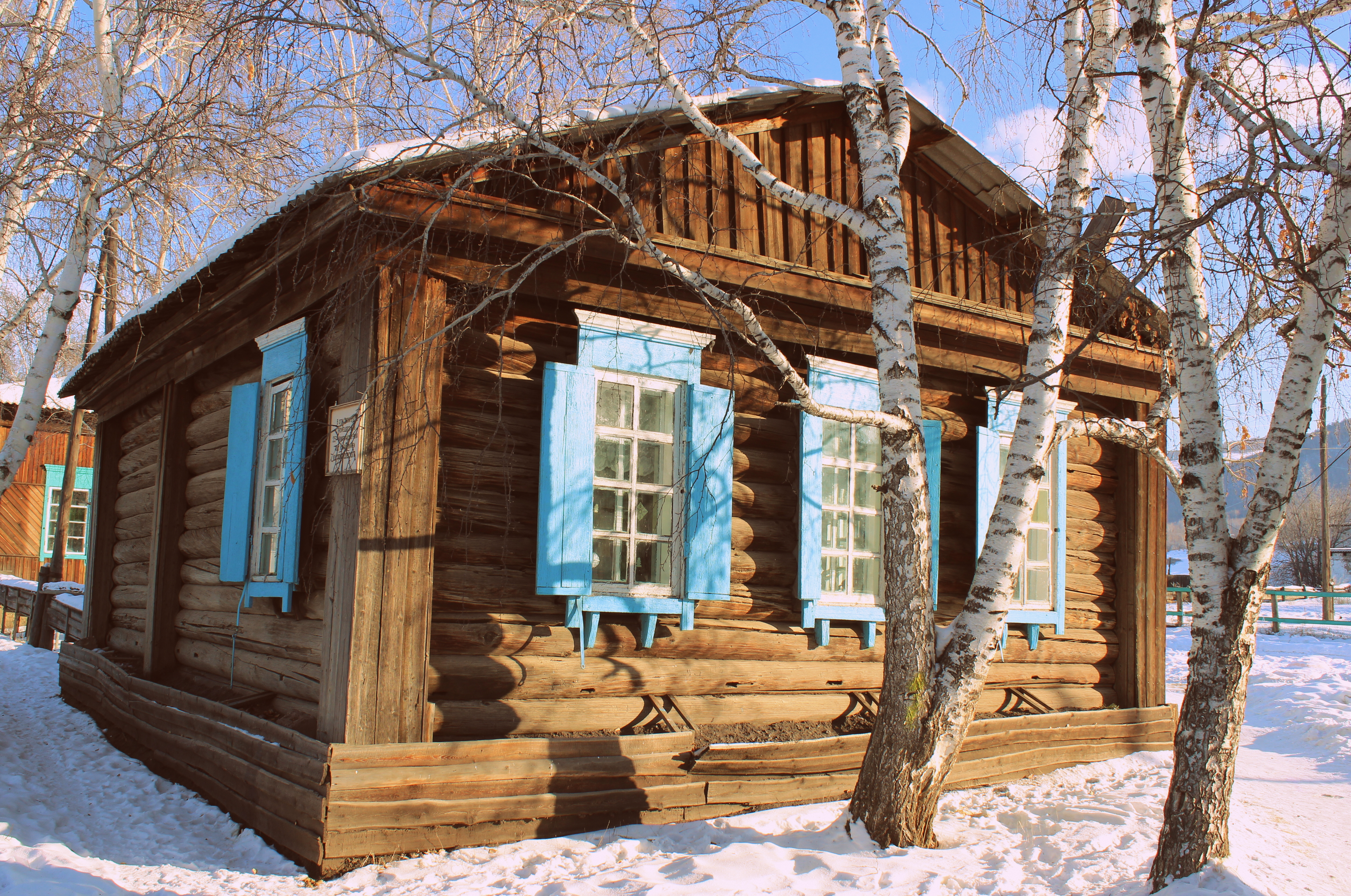 Дом, в котором располагался штаб 35-го кавалерийского полка, где служил во время гражданской войны маршал К. К. Рокоссовский. Село Желтура Джидинского района Бурятии